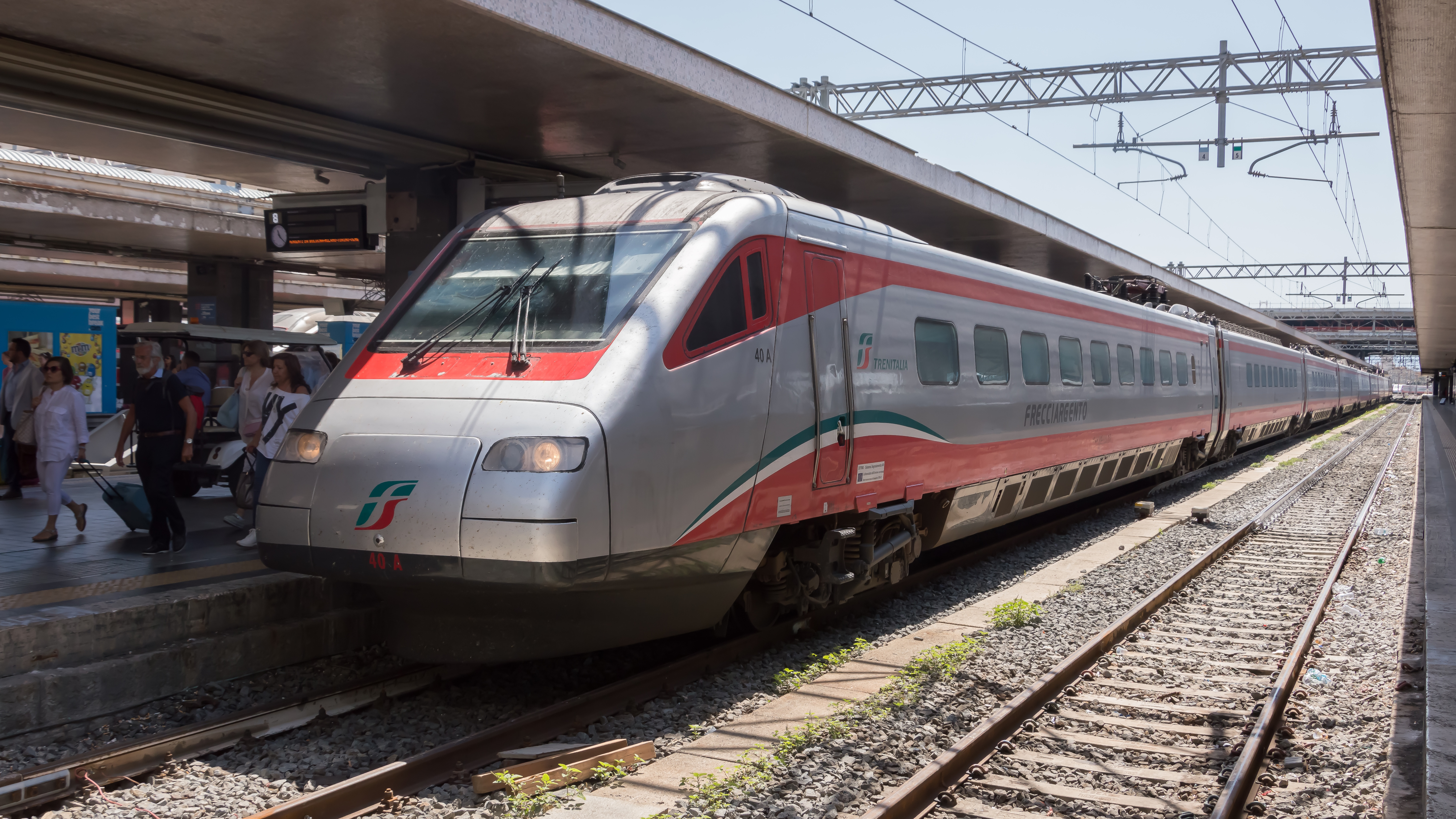 Rome Termini Frecciargento ETR 485 40 uit Bolzano. Deze stellen kunnen op conventionele lijnen hogere snelheden halen, dan standaard treinen. De maximum snelheid bedraagt 250 km/u